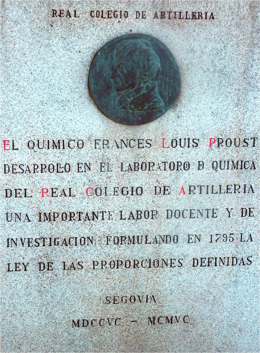 Plaque commémorative de découverte de la loi des proportions définies par Louis Proust